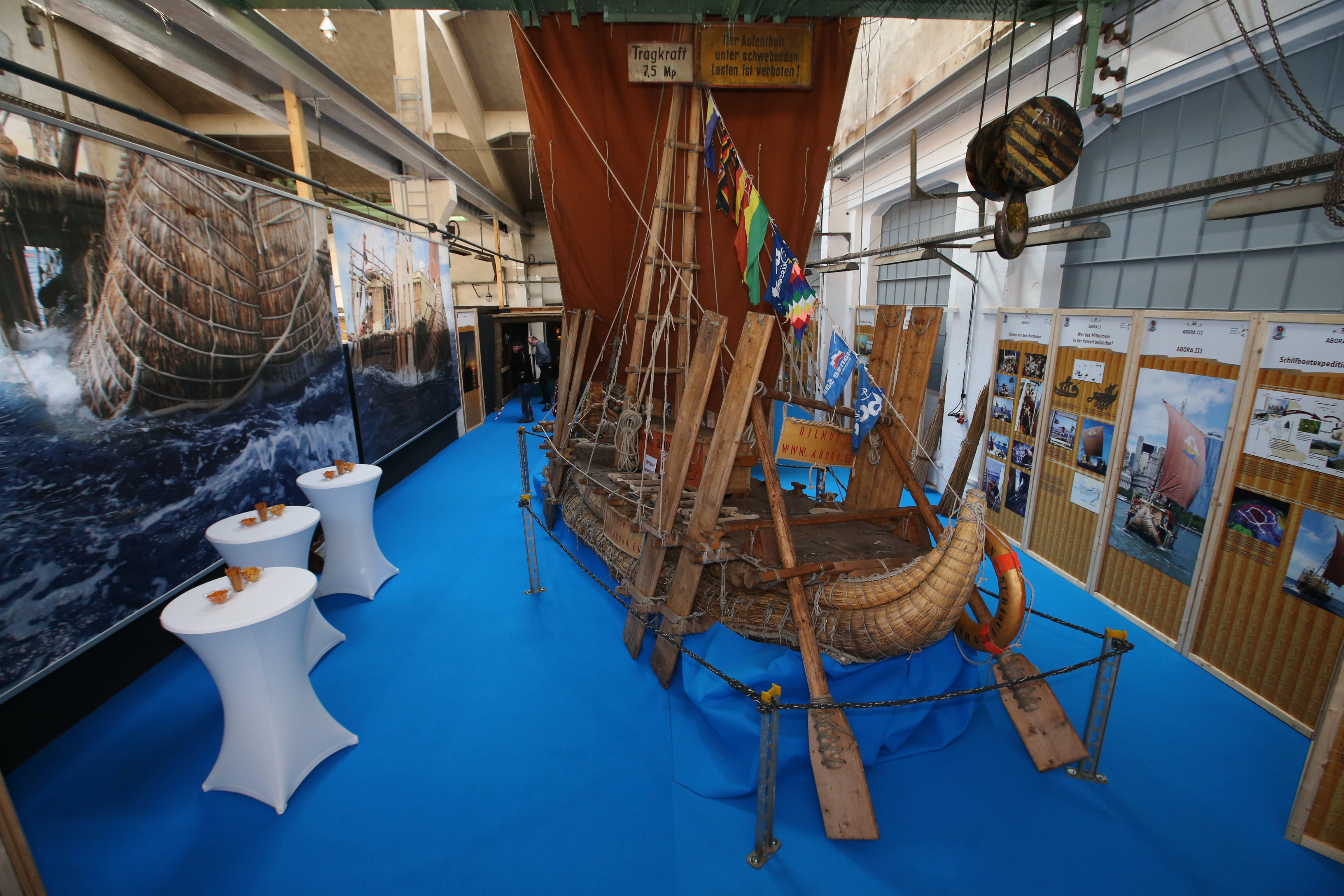 Blick in die ABORA Sonderausstellung in Braunsbedra